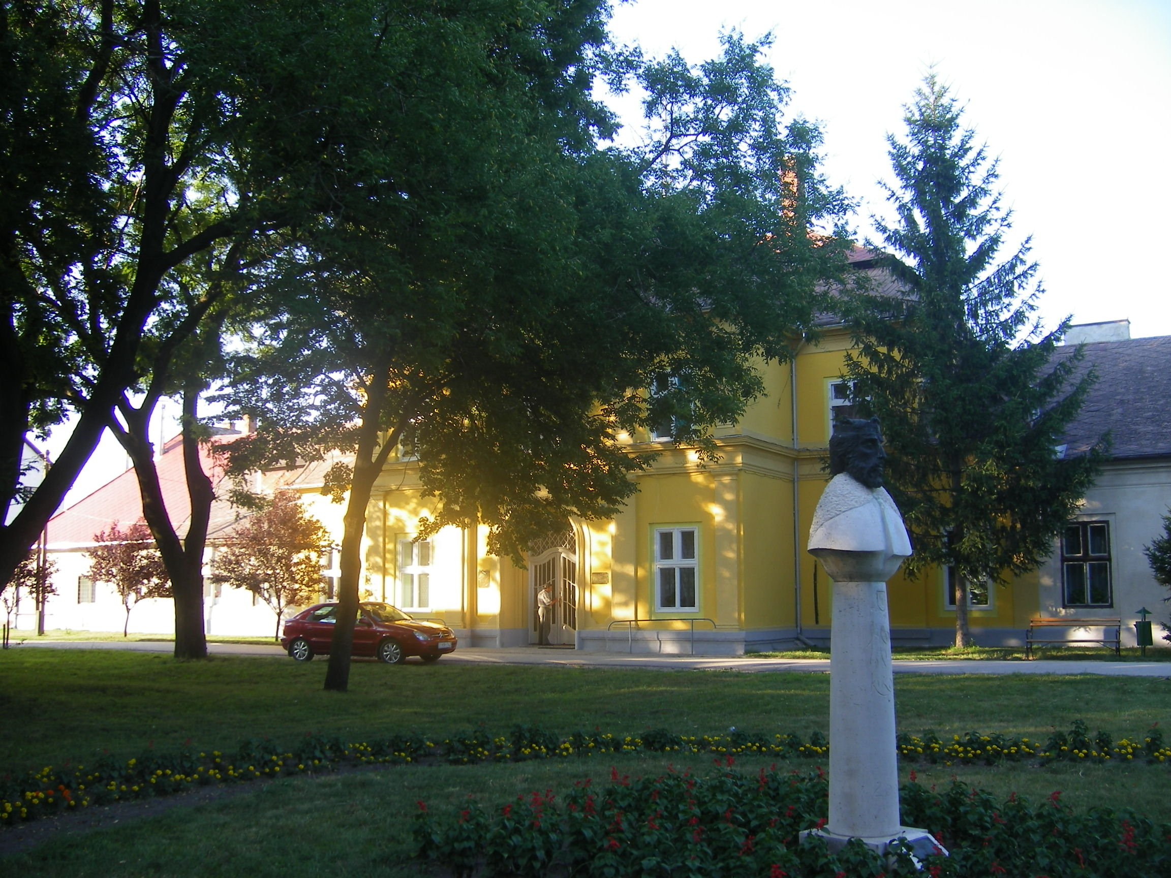 Ács - művelődési ház és Szent István mellszobra